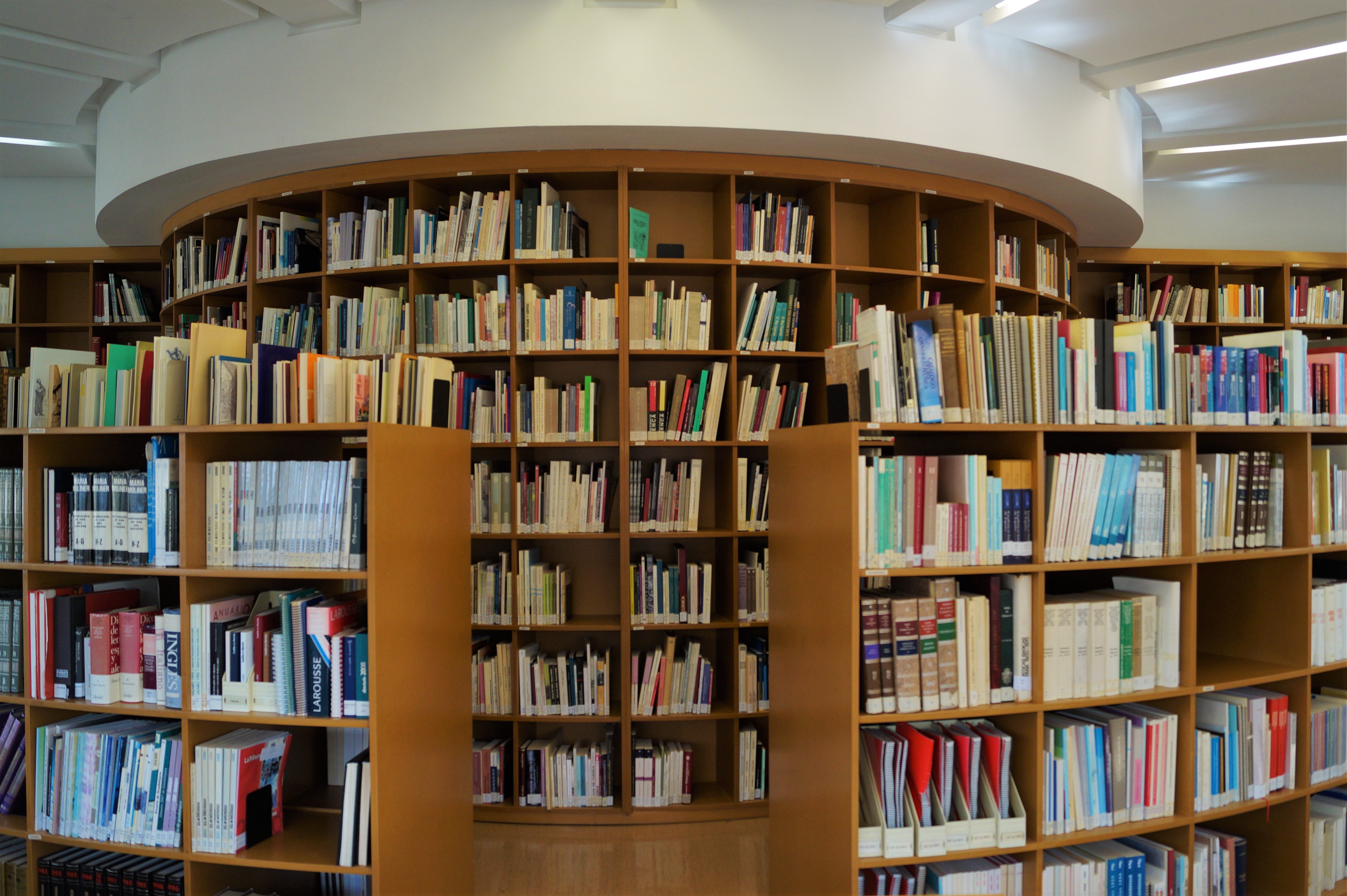 Instalaciones de Centro de Estudios de Castilla-La Mancha